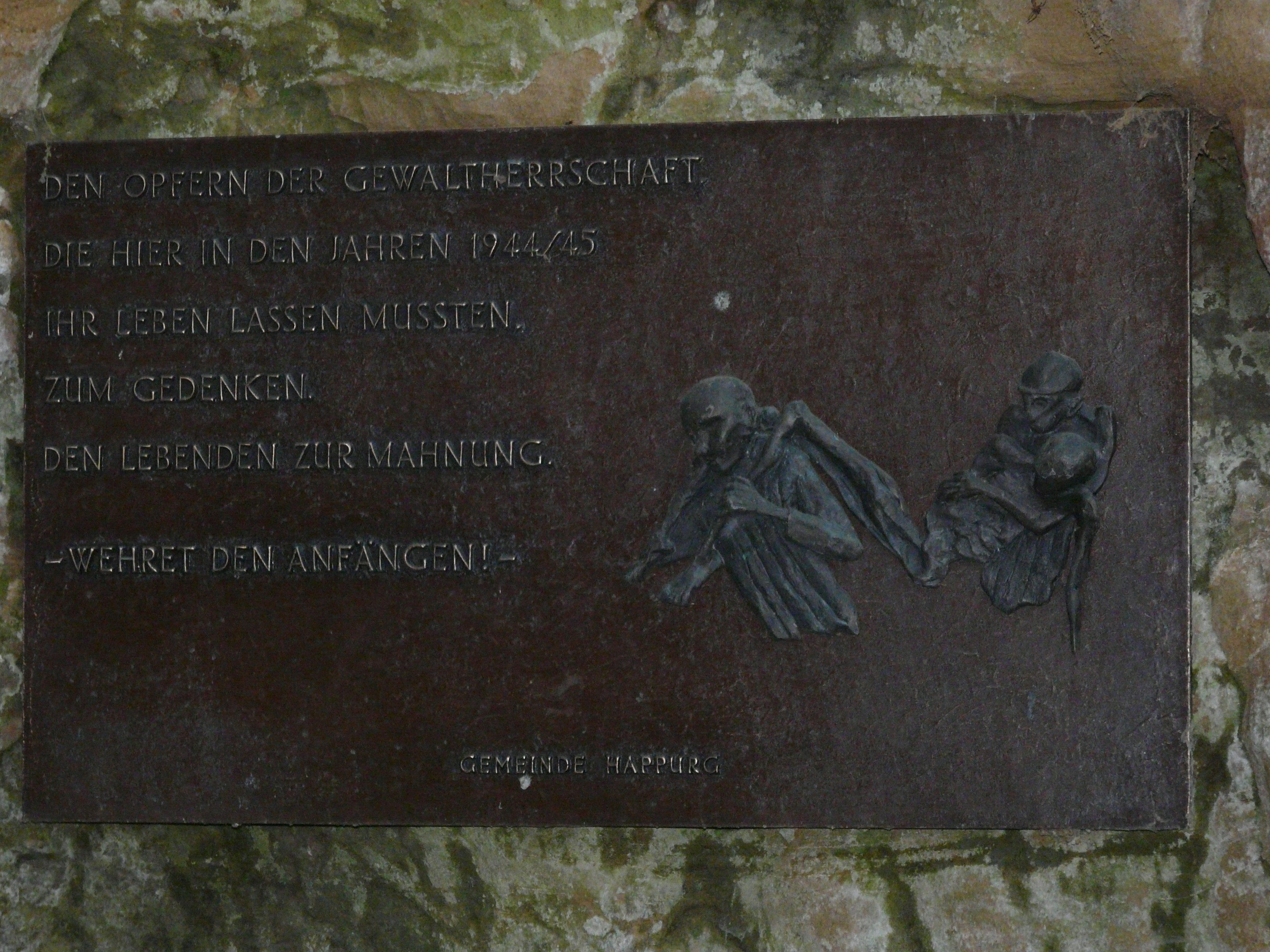 Die beim Eingang F des Doggerstollens in der Houbirg angebrachte Gedenktafel